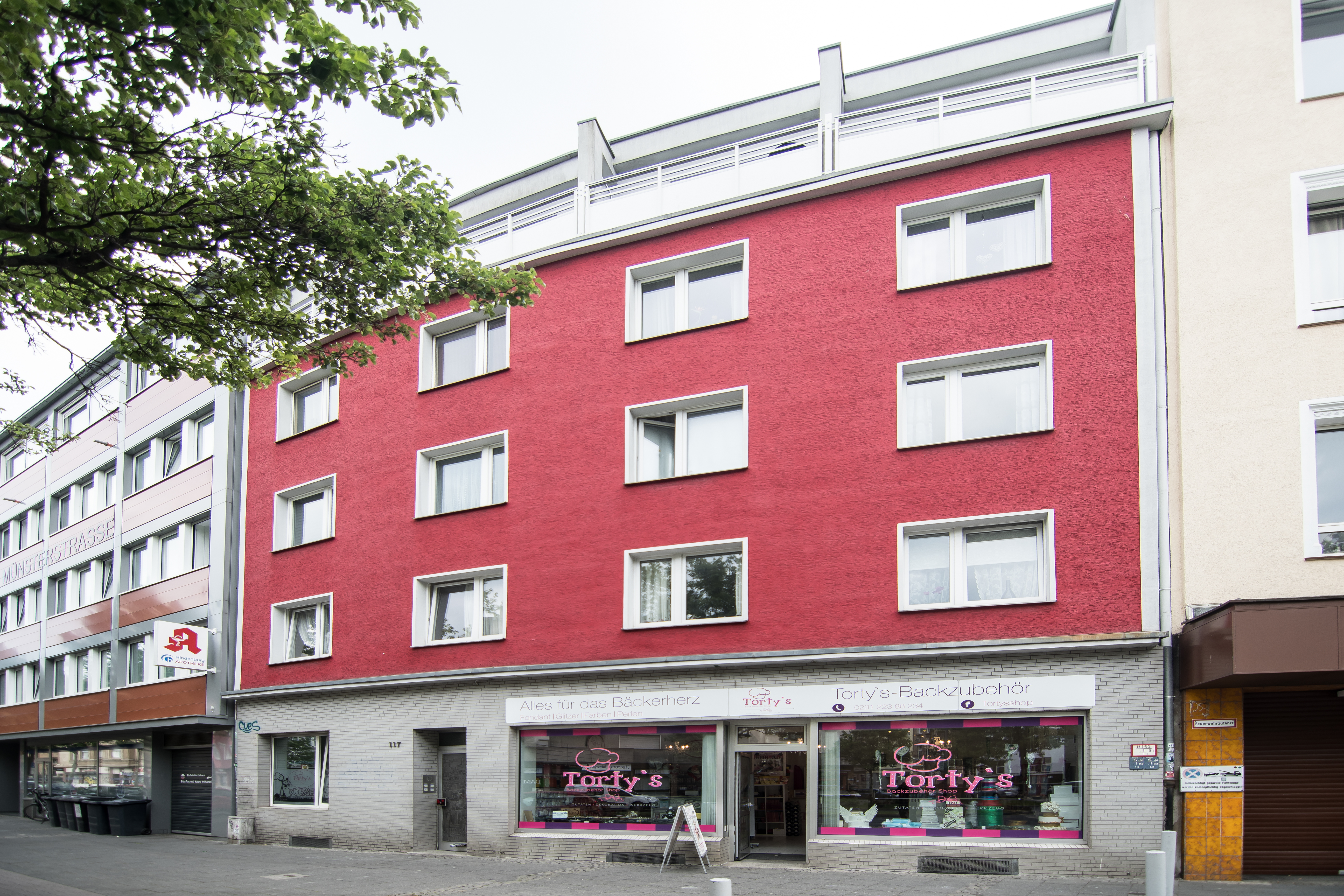 Stolpersteine vor dem Wohnhaus von Max und Therese Grünberg in Dortmund